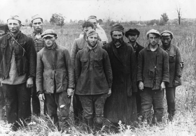 This description has been identified as biased or incorrect: Original Nazi-propaganda descriptionJüdische Heckenschützen. Wenig vertrauenerweckend sehen sie aus. Unter dieser Gruppe (im Bild mit Mantel) ein Rabbiner, verschmutzt und arbeitsscheu, wie alle seine Rassegenossen. G 8037 PK-Aufnahme Kriegsberichter Fritsch (Wb)